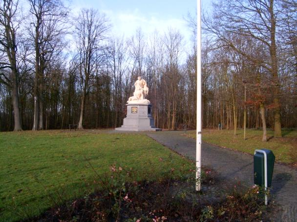 Monument bij Heiligerlee